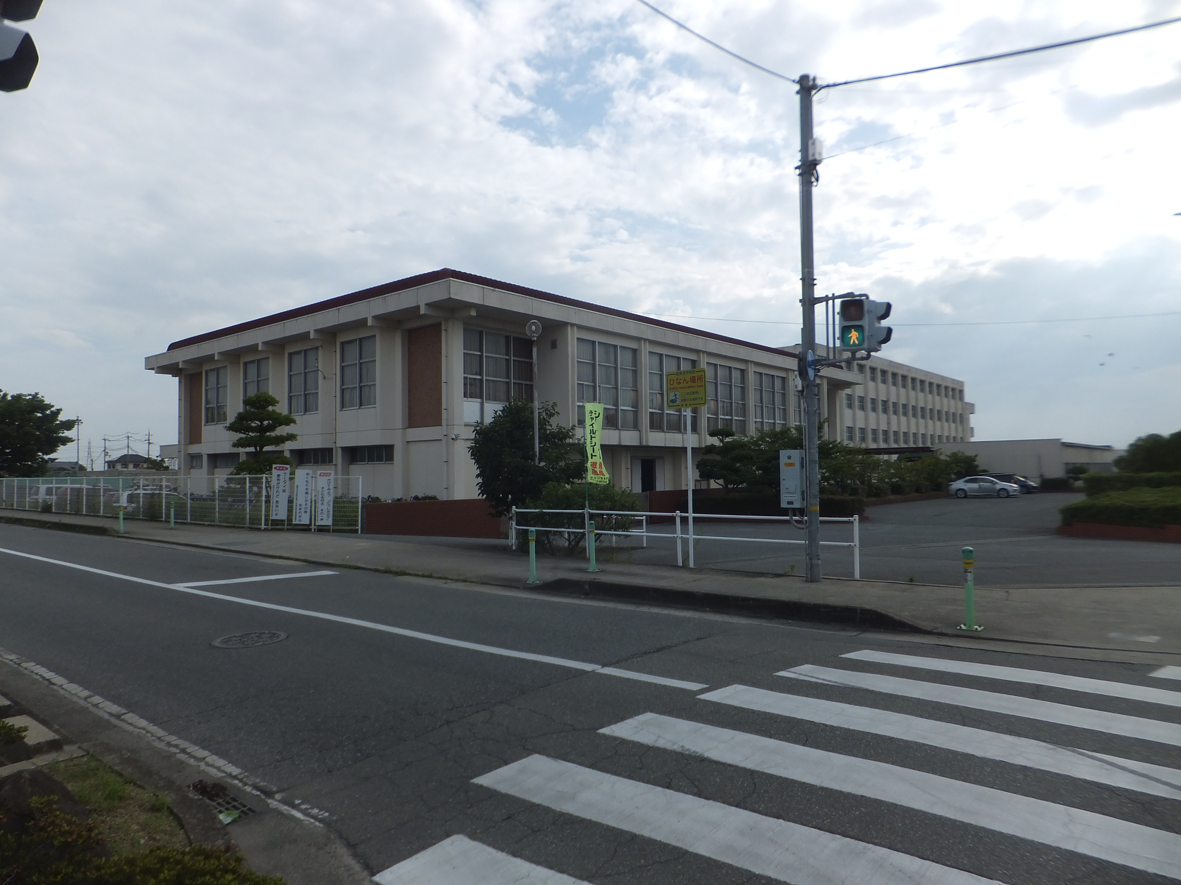 稲美町立稲美北中学校